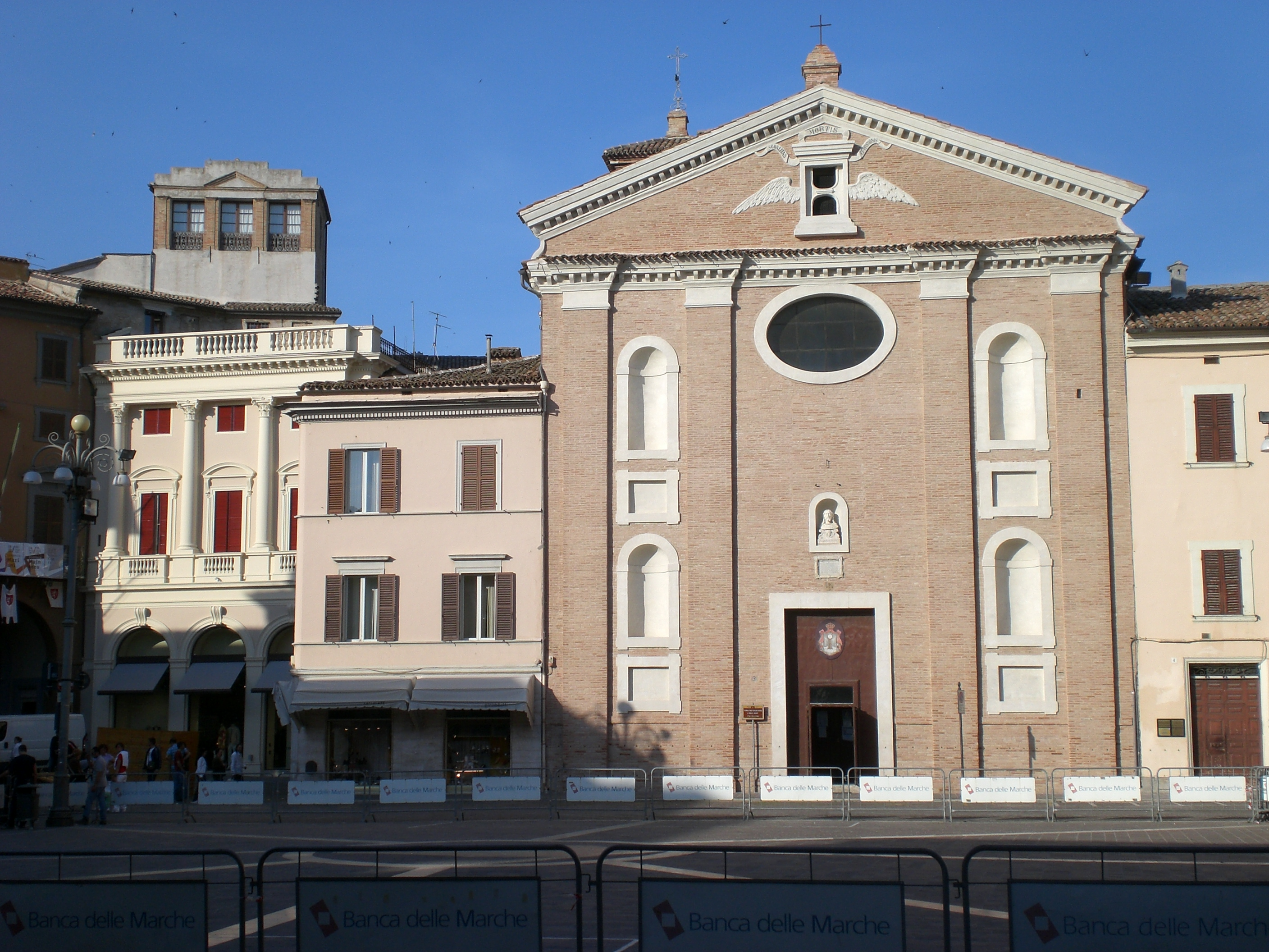 Chiesa dell'Adorazione, 1744.